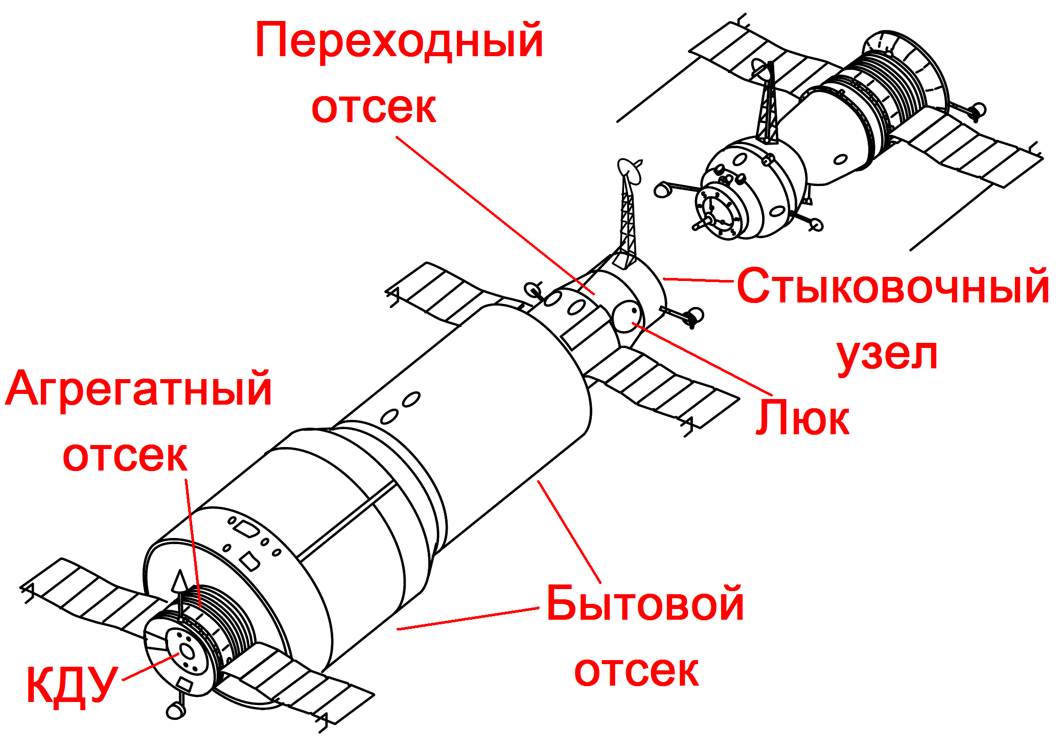 Салют-1 и Союз 10 или Союз-11